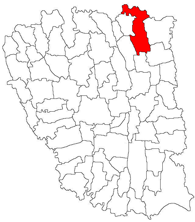 Categorie:Hărţi ale judeţului Galaţi